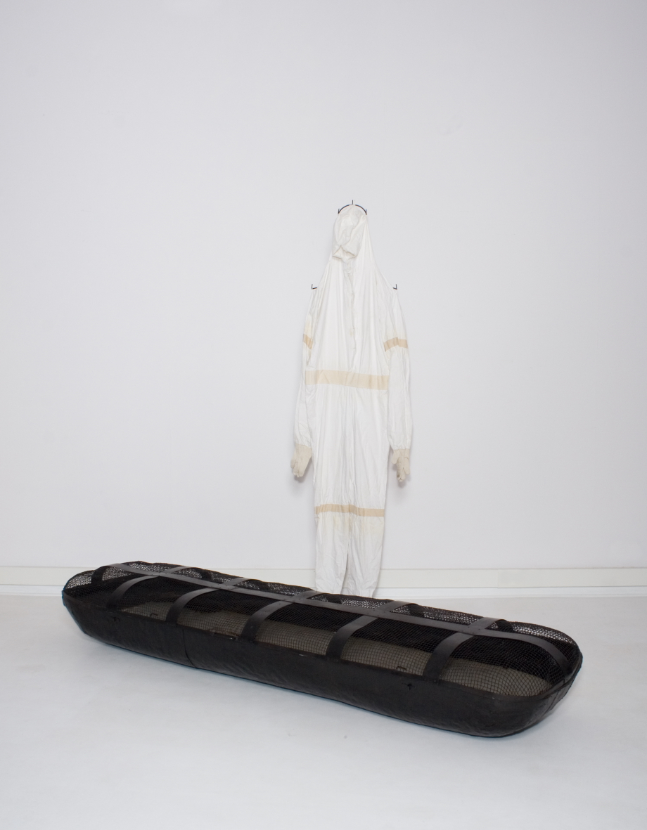 "Łódź i skafander" - dzieło Pawła Althamera z kolekcji stałej Zachęty Narodowej Galerii Sztuki / "Łódź i skafander" - work of Paweł Althamer from the permanent collection of Zachęta National Gallery of Art (Warsaw, Poland)